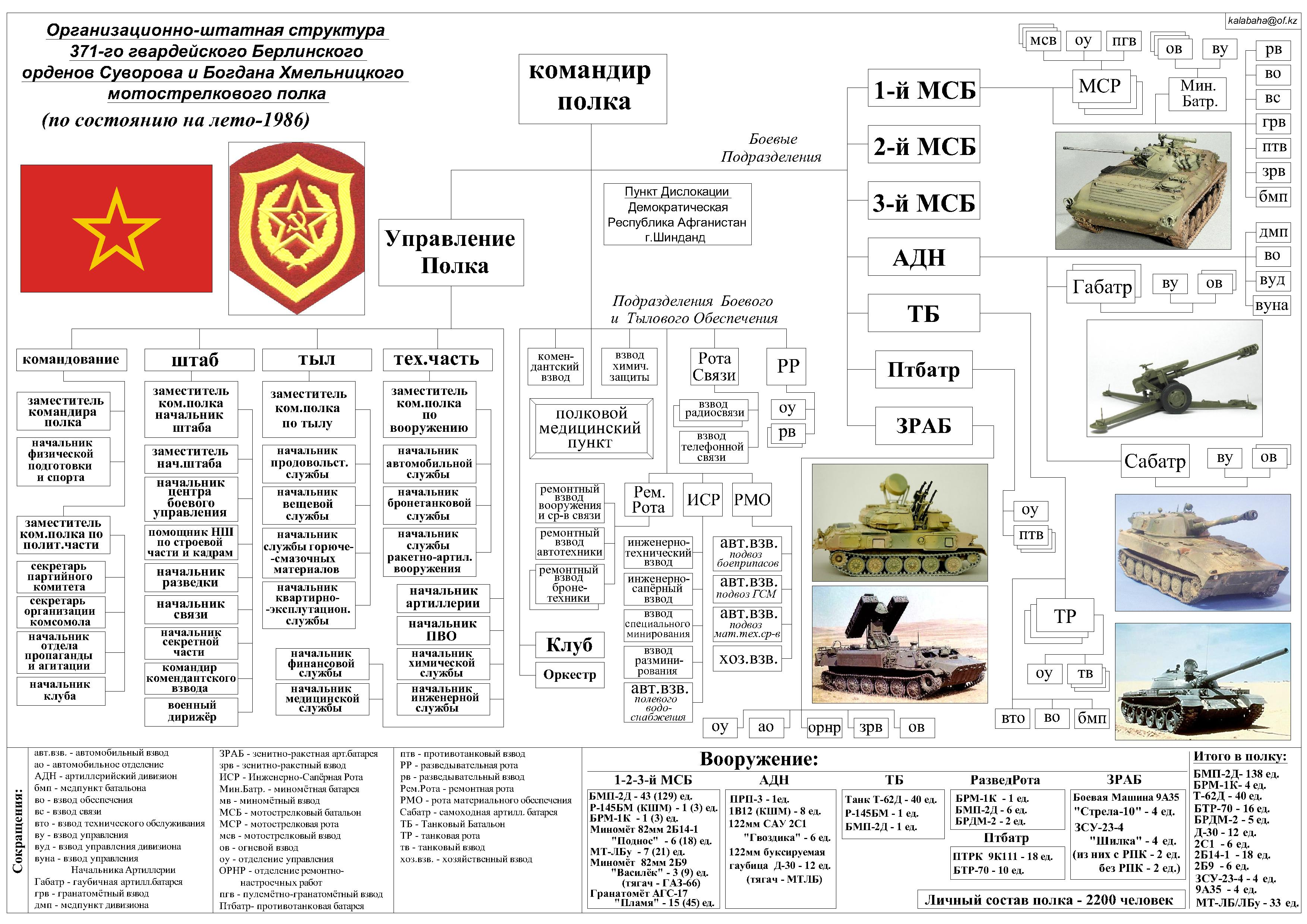 Организационно-штатная структура 371-го гвардейского мотострелкового полка 5-й гв.мсд на лето-1986. Собственная работа на основе данных, взятых с сайта 371-го гв.мсп , а также с сайта 5-й гв.мсд . Отчерчено в AutoCAD 2005